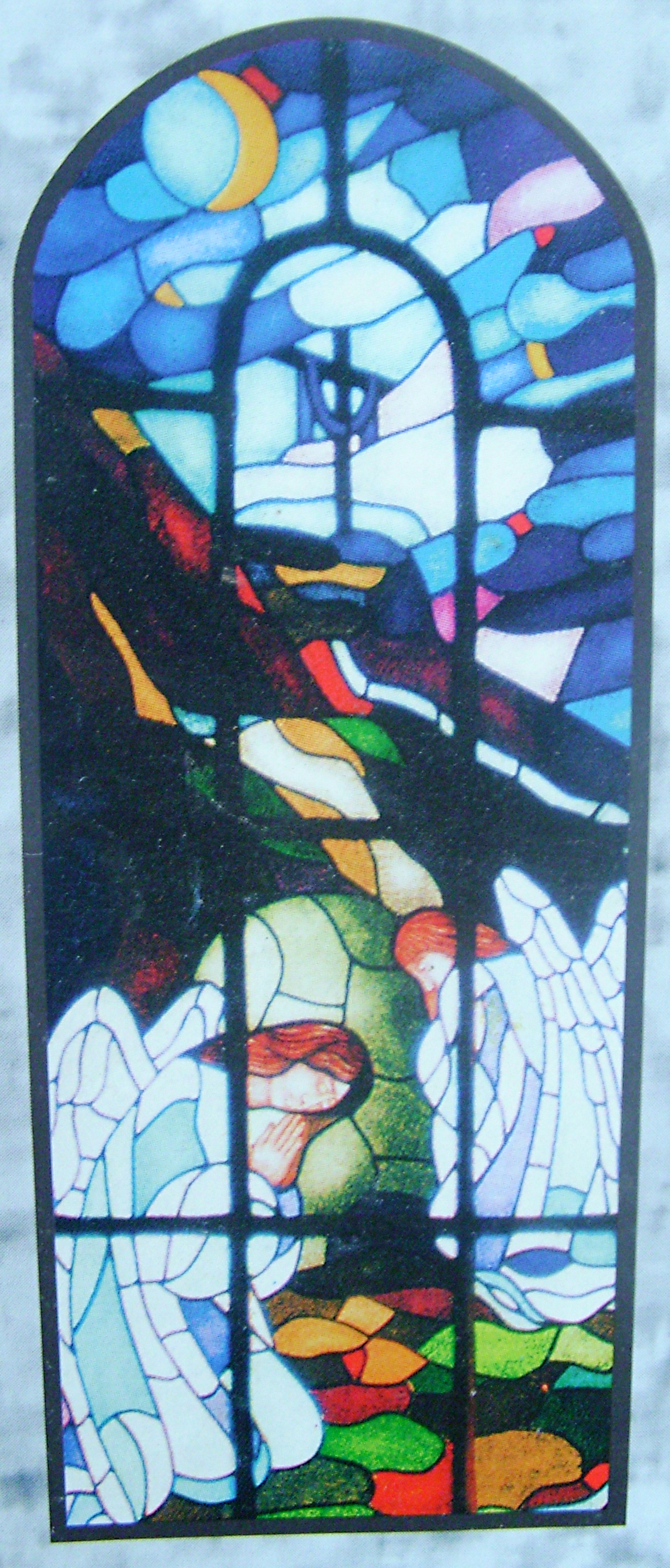 Grób Pański - witraż w kościele Imienia Maryi w Bączalu Dolnym (diecezja rzeszowska)